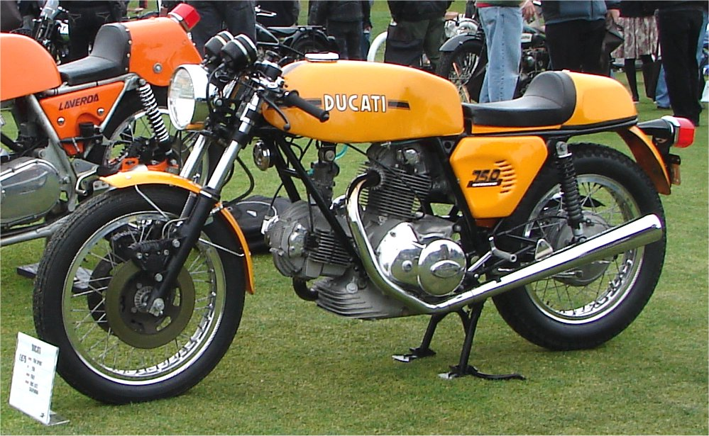 Ducati 750 Sport del 1973